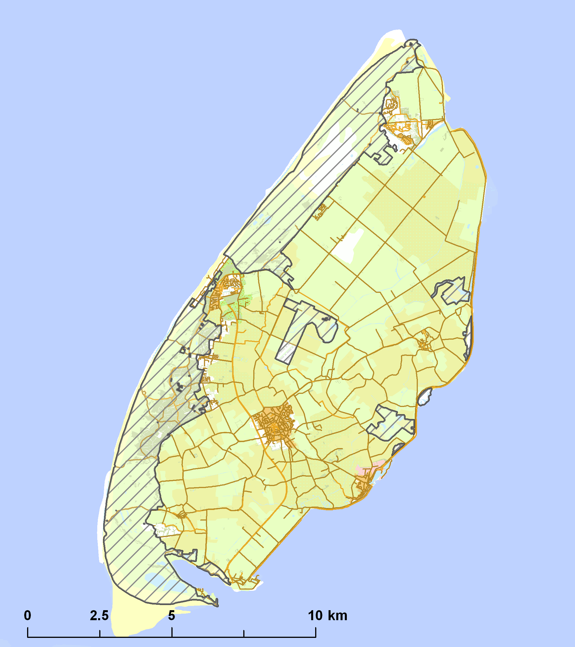 Natura2000 - Duinen en Lage Land Texel.png